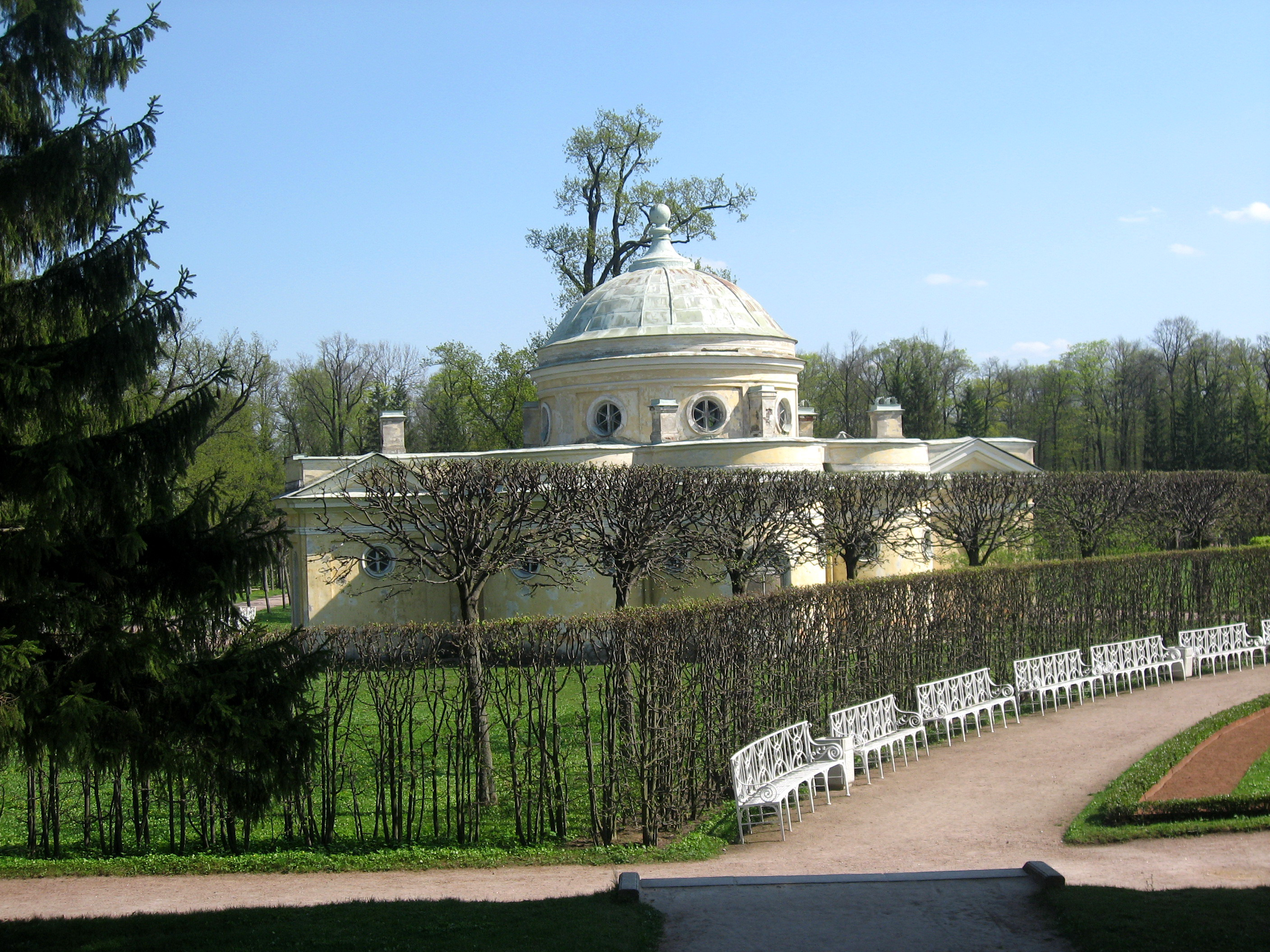 Kateřinský palác, zahrady